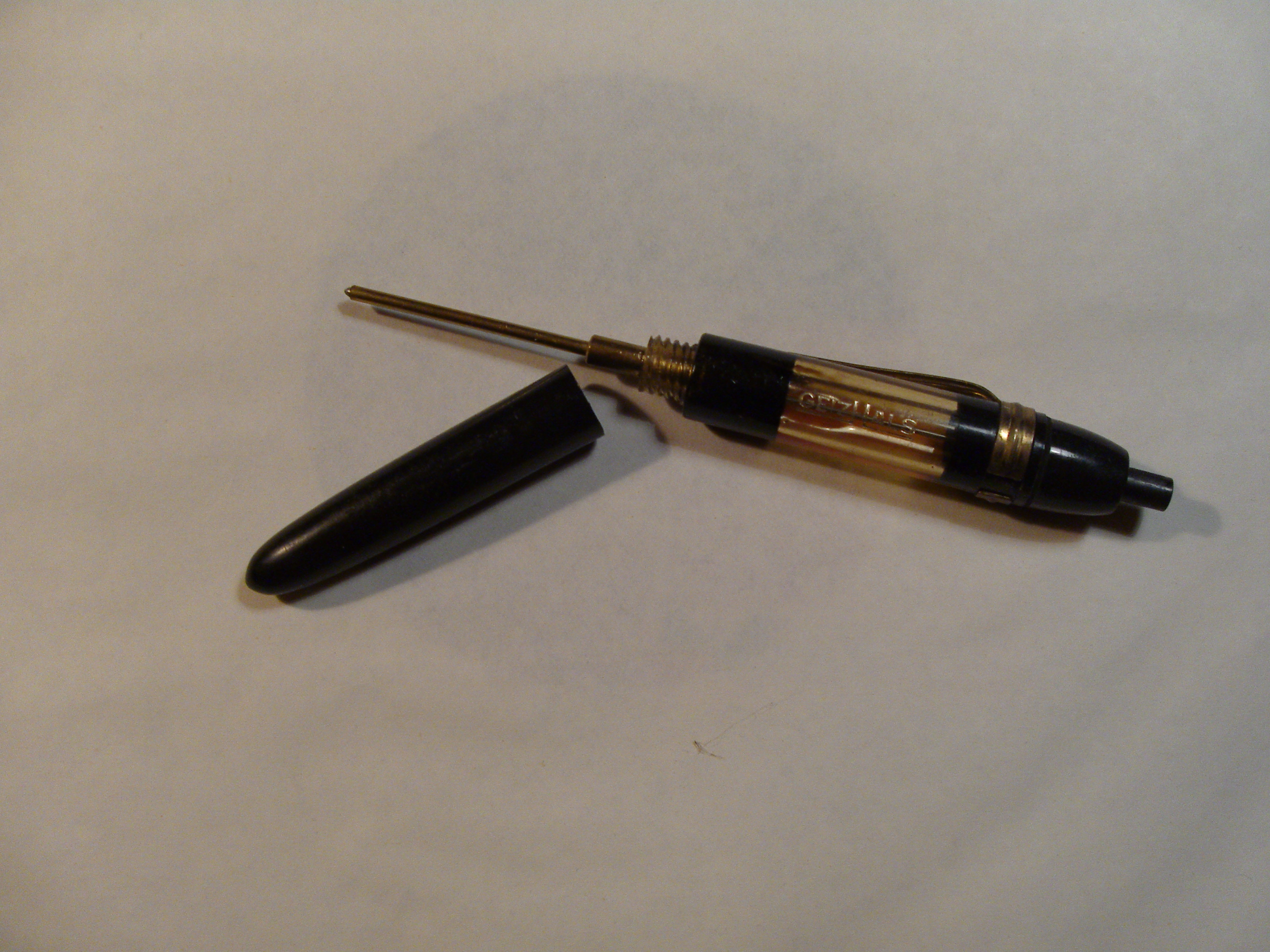 Punktöler (umgangssprachlich Geizhals) zur Verwendung in der Feinmechanik